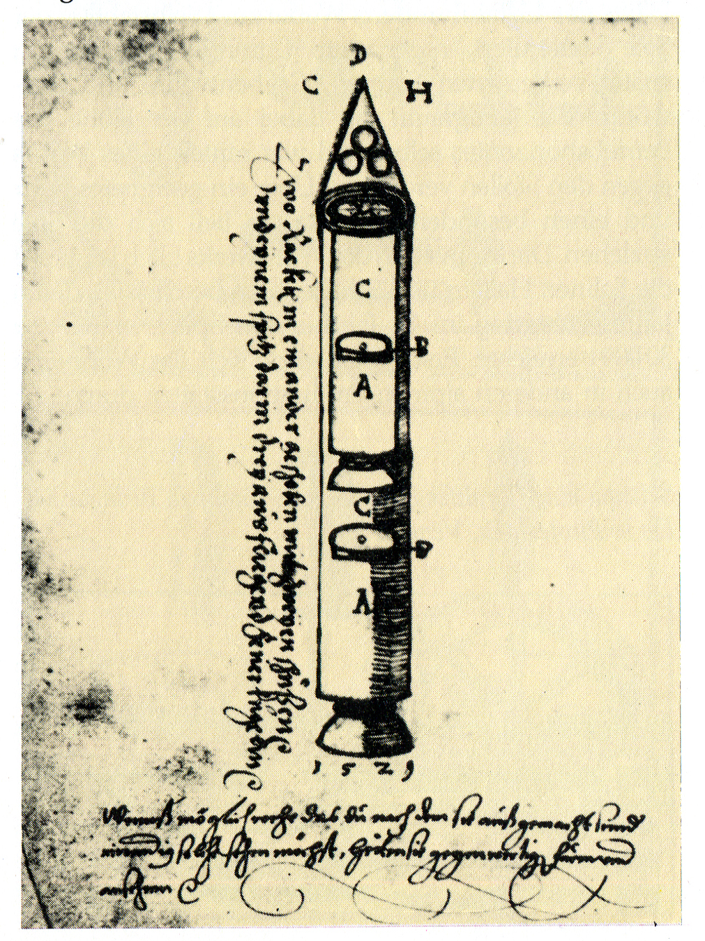 Двухступенчатая ракета XVI века